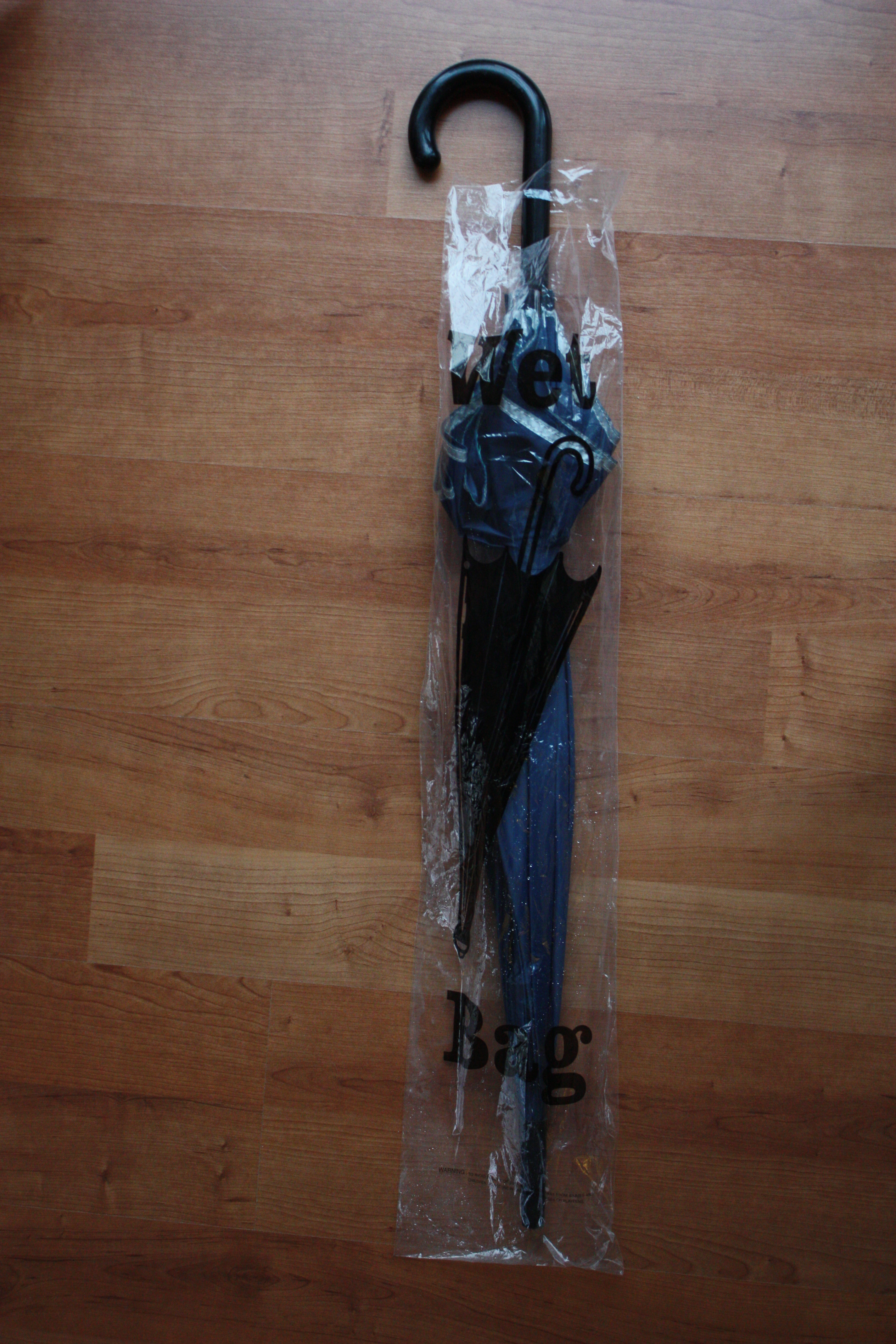 Wet bag for wet umbrellas, Regenschirmtüten, Polyethylen